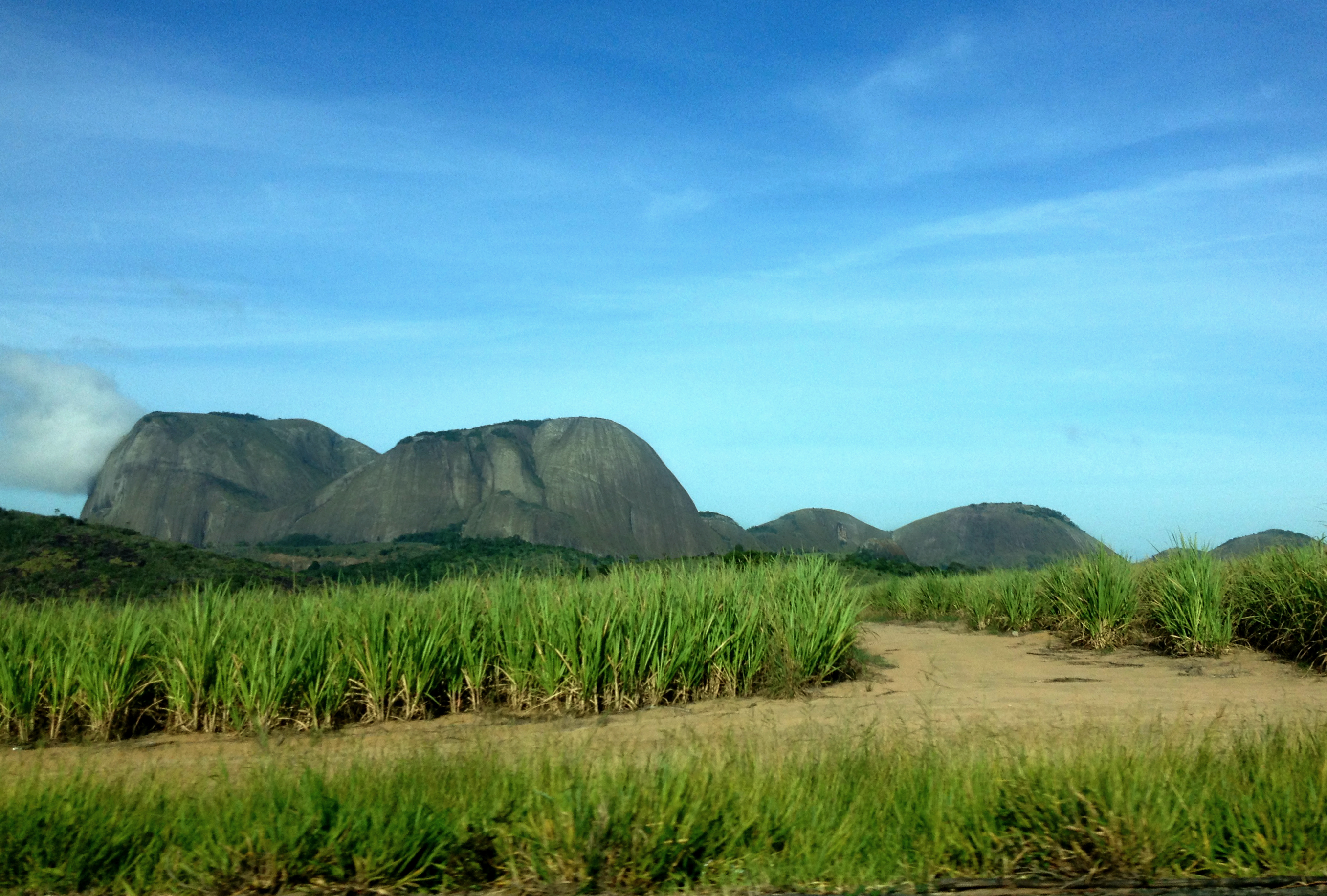 Serra dos Aimorés em Nanuque